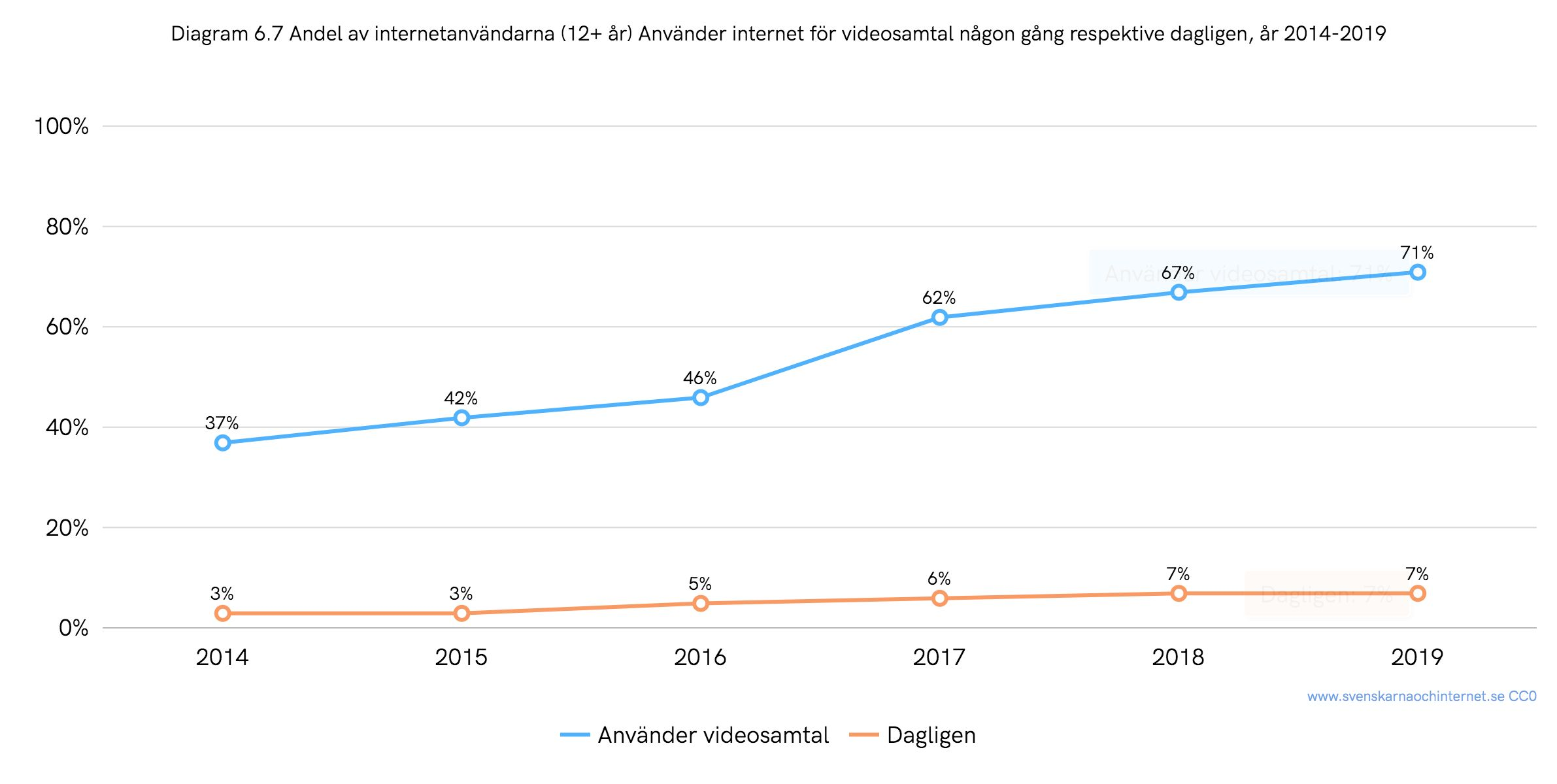 Andel av de svenska internetanvändarna (12+ år) som använder internet för videosamtal någon gång respektive dagligen, år 2014–2019. Siffror från undersökningen "Svenskarna och internet".